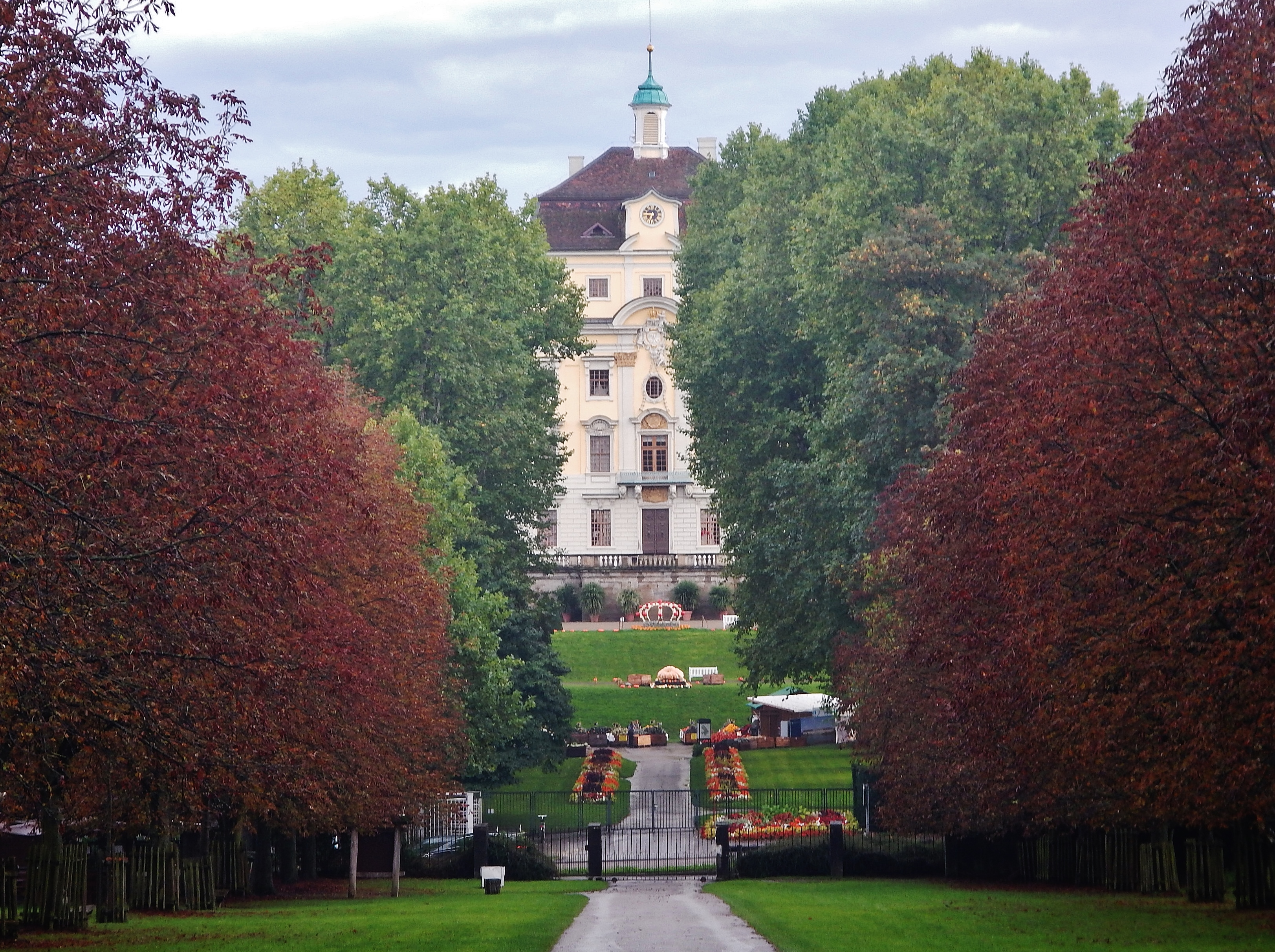 Blick auf das Residenzschloss in Ludwigsburg (1704 -1733; Herzog Eberhard Ludwig von Württemberg)